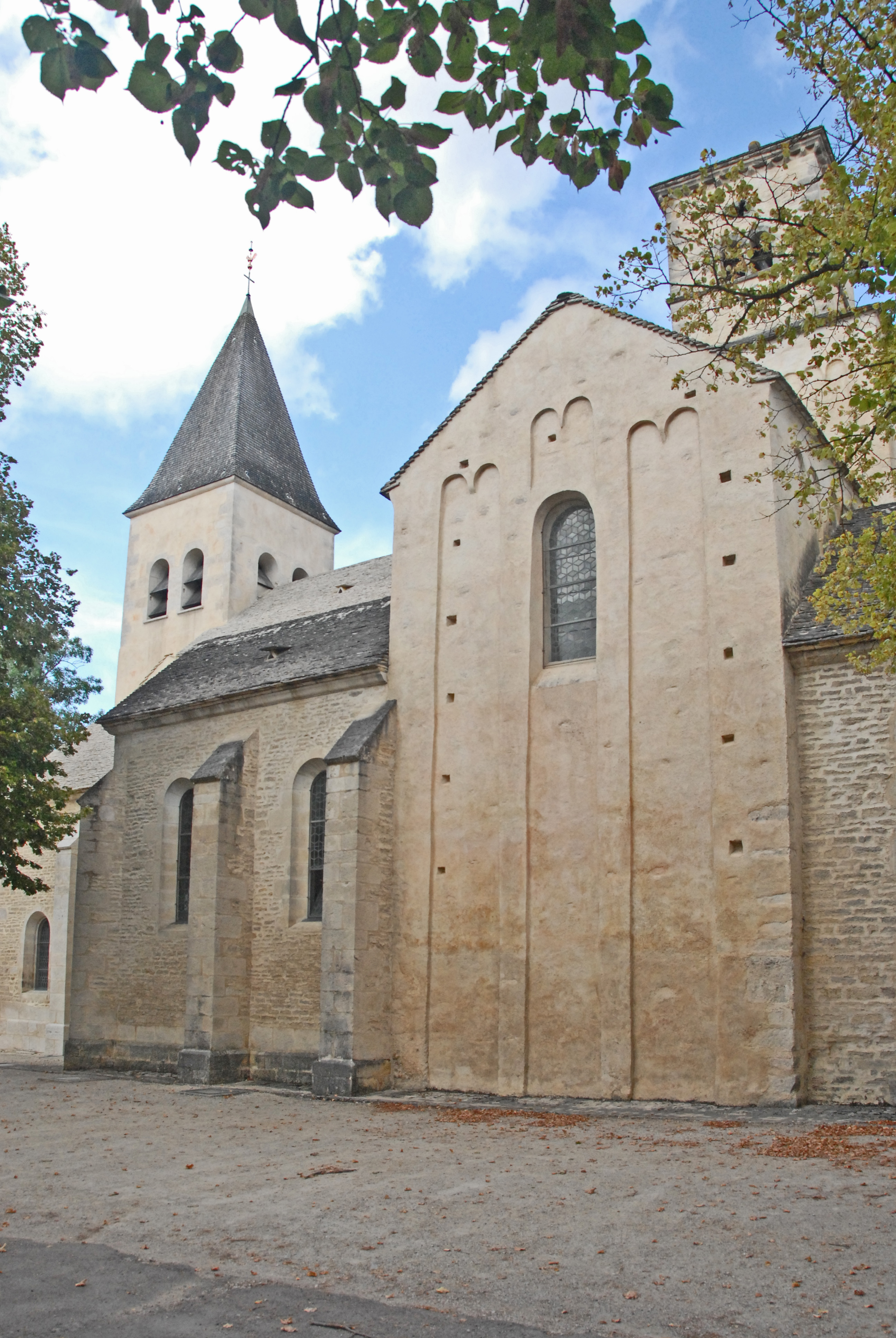 St-Vorles de Châtillon-sur-Seine, Lang- u.Querhaus von O